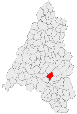 Categorie:Hărţi ale judeţului Bihor